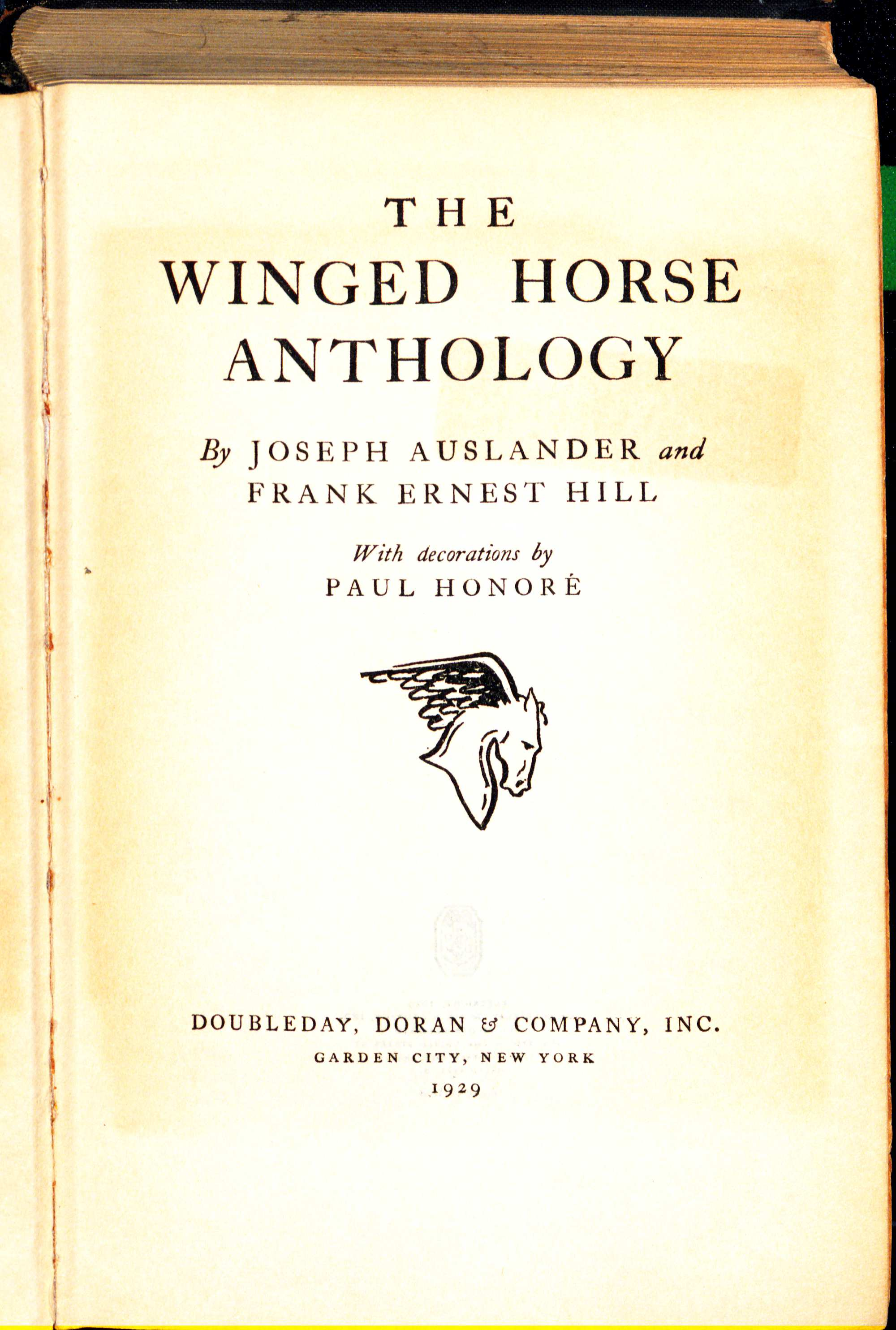 Joseph Auslander, Frank Ernest Hill: The Winged Horse. Anthology. Garden City : Doubleday, 1929